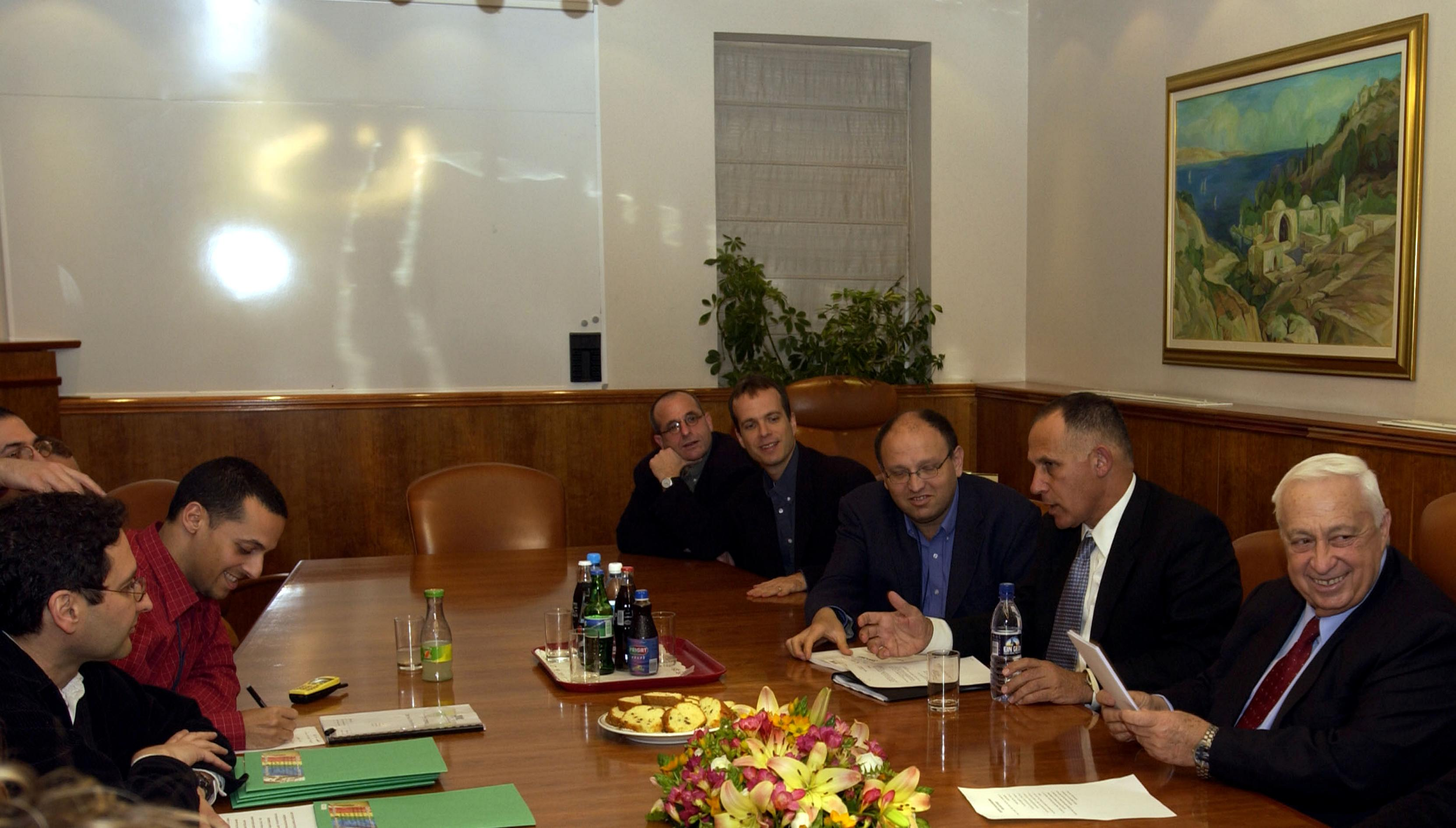 P.M Ariel Sharon meeting with representatives of the Homosexual and Lesbian community, at the P.M's office in Jerusalem (07/06/2002) ראש הממשלה, אריאל שרון, נפגש עם נציגי הקהילה הגאה במשרדו בירושלים